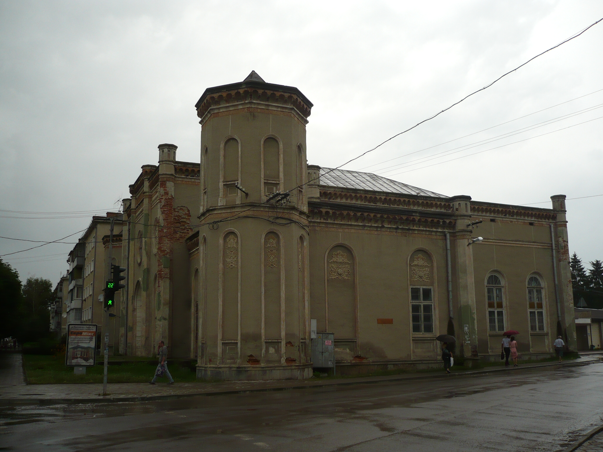 Czortków. Synagoga